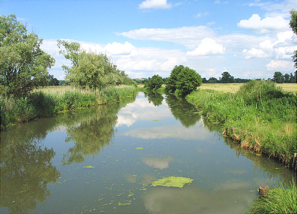 Stille Oder im nördlichen Oderbruch, Brandenburg